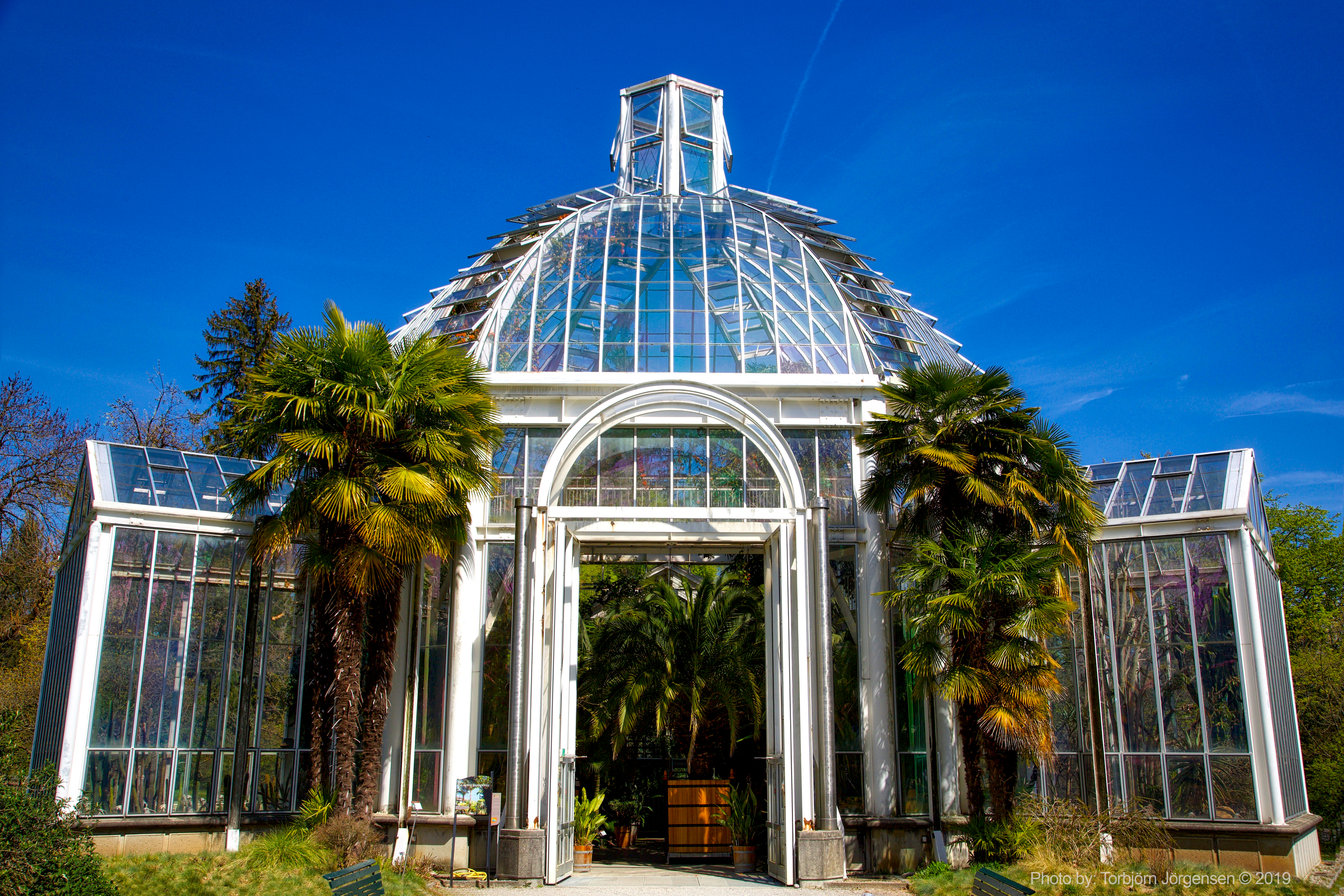 Serre tempérée - Conservatoire et Jardin botaniques de la ville de Genève